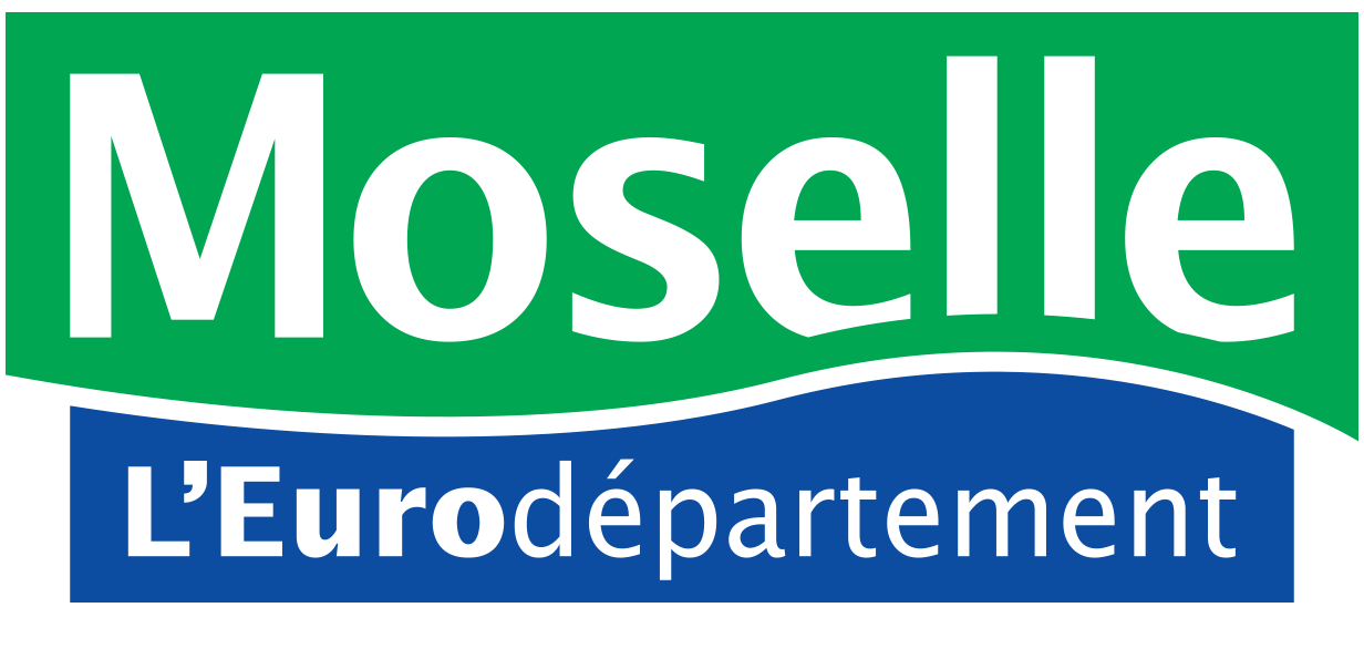 Logo du CD57 depuis mai 2019